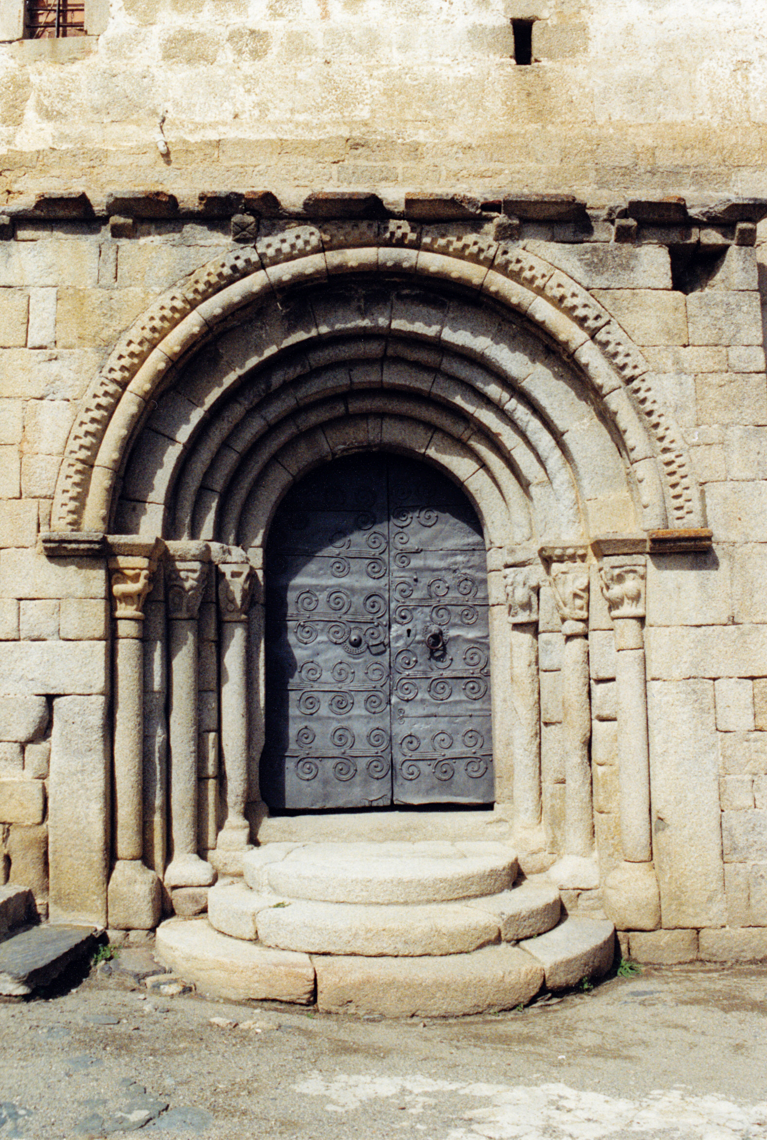 Espagne - Basse-Cerdagne - Église Saint-Estève de Guils de Cerdanya